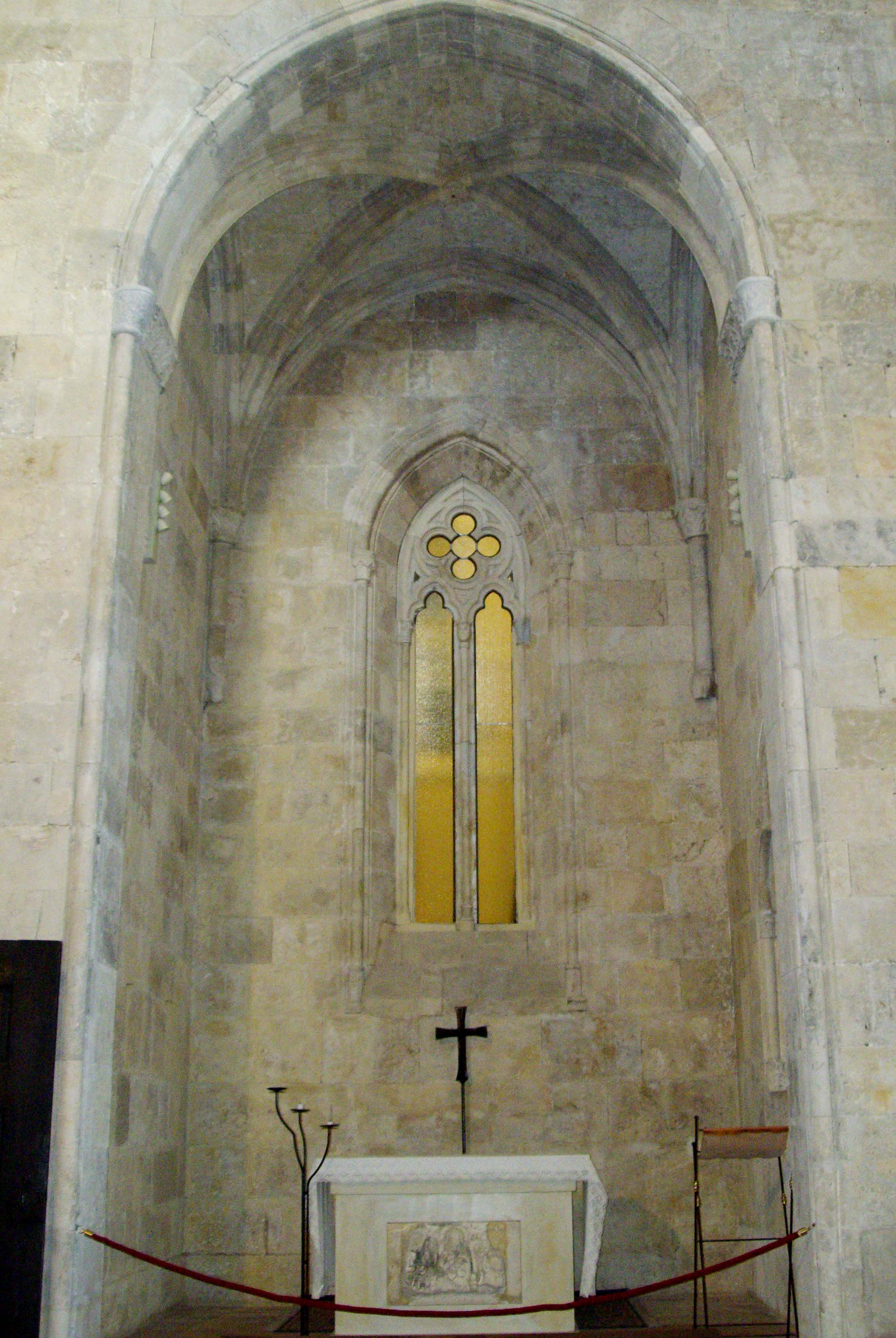 Cappella Pisana (XIV secolo) nel Duomo di Cagliari